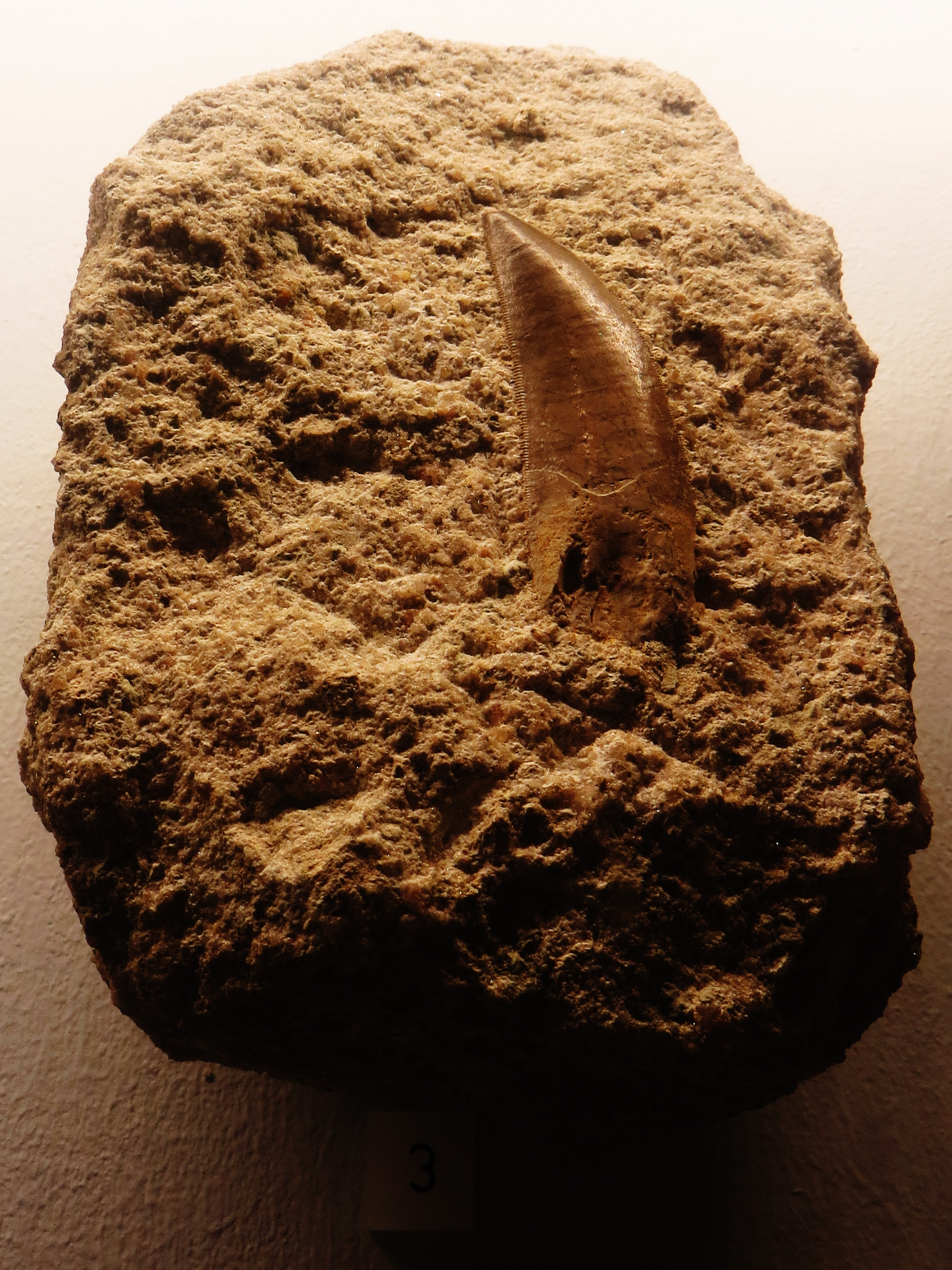 Fossil of Belodon, an extinct reptile - Took the picture at Museum of Paleontology, Tuebingen